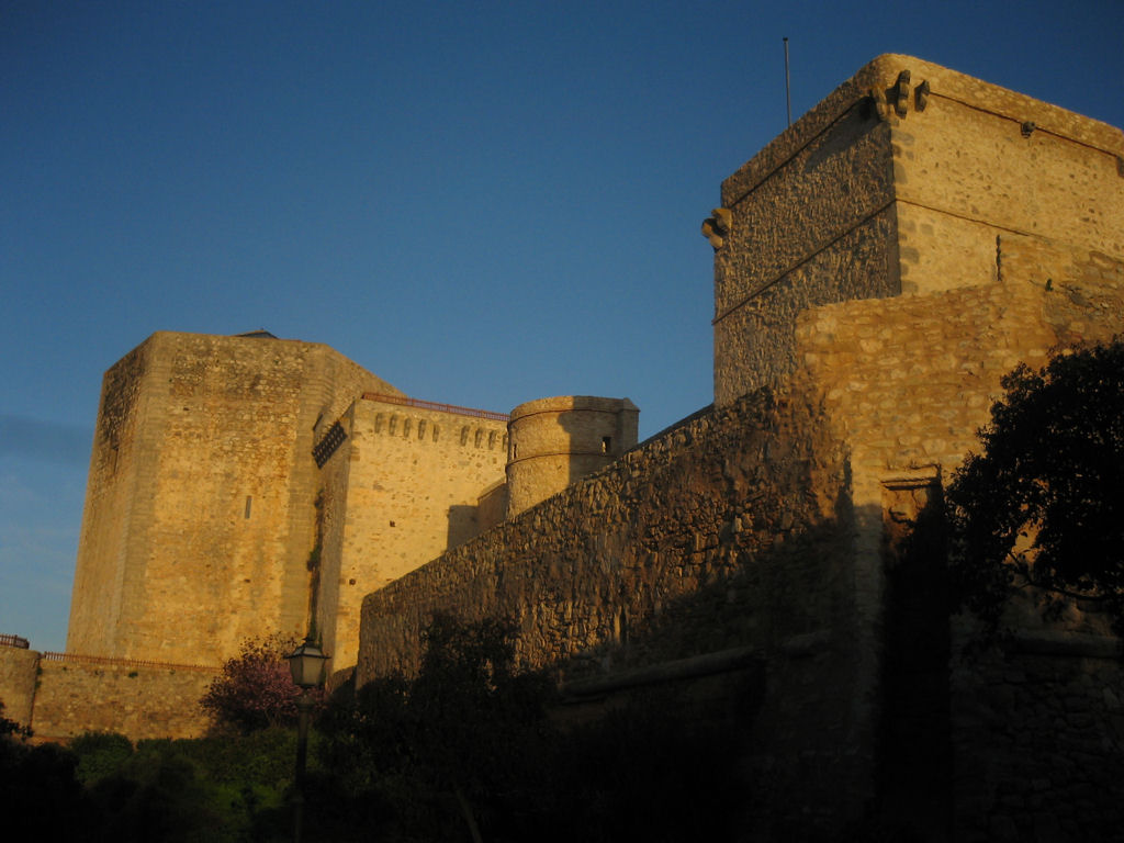 Castillo de Santiago (Sanlúcar de Barrameda, provincia de Cádiz, Andalucía).